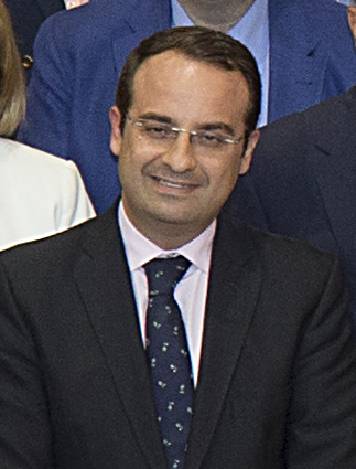 Grupo Popular en la Asamblea de Madrid